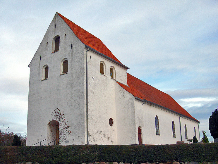 fra sydvest